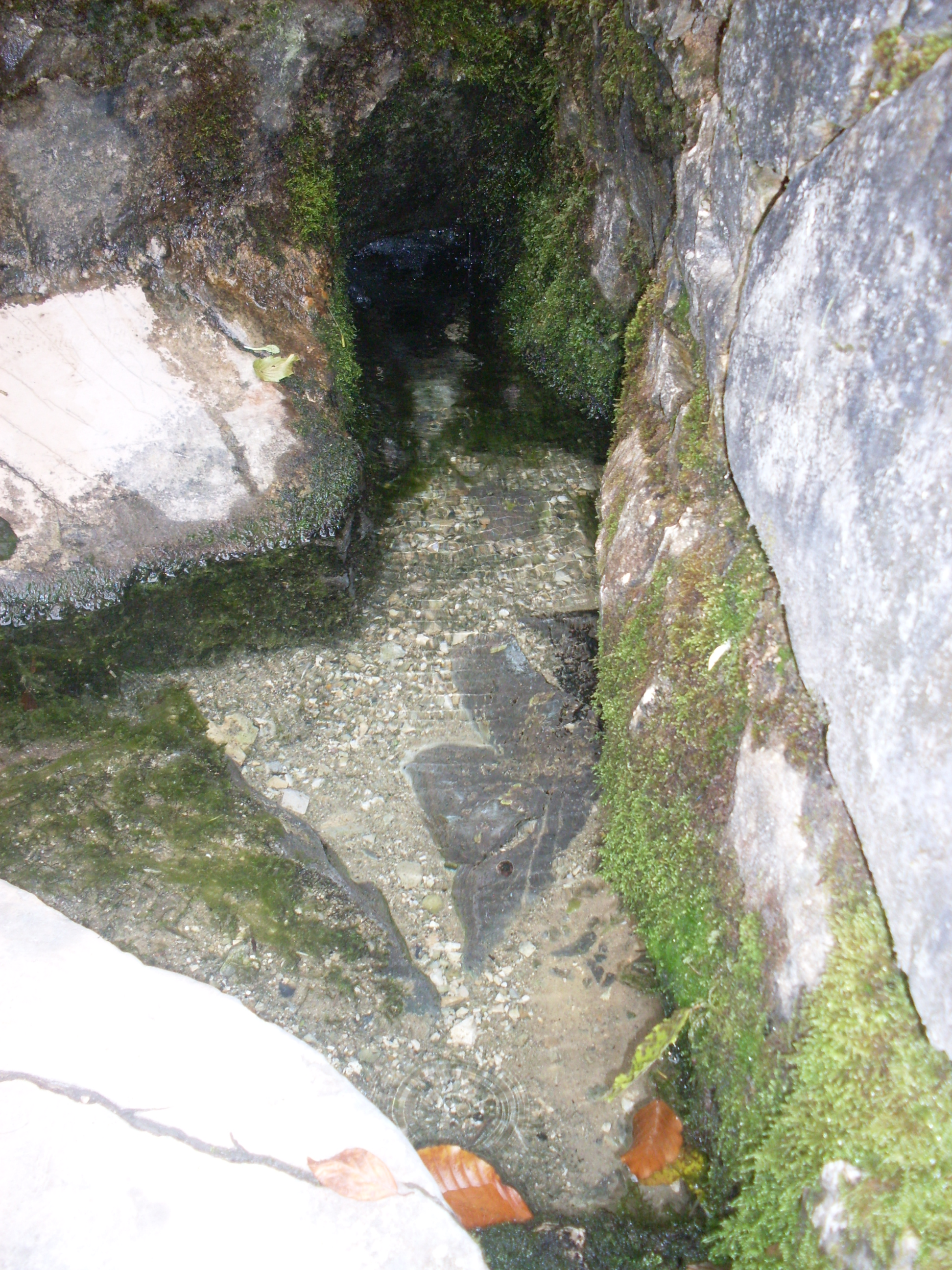 Źródło Eliasza (Czerna)